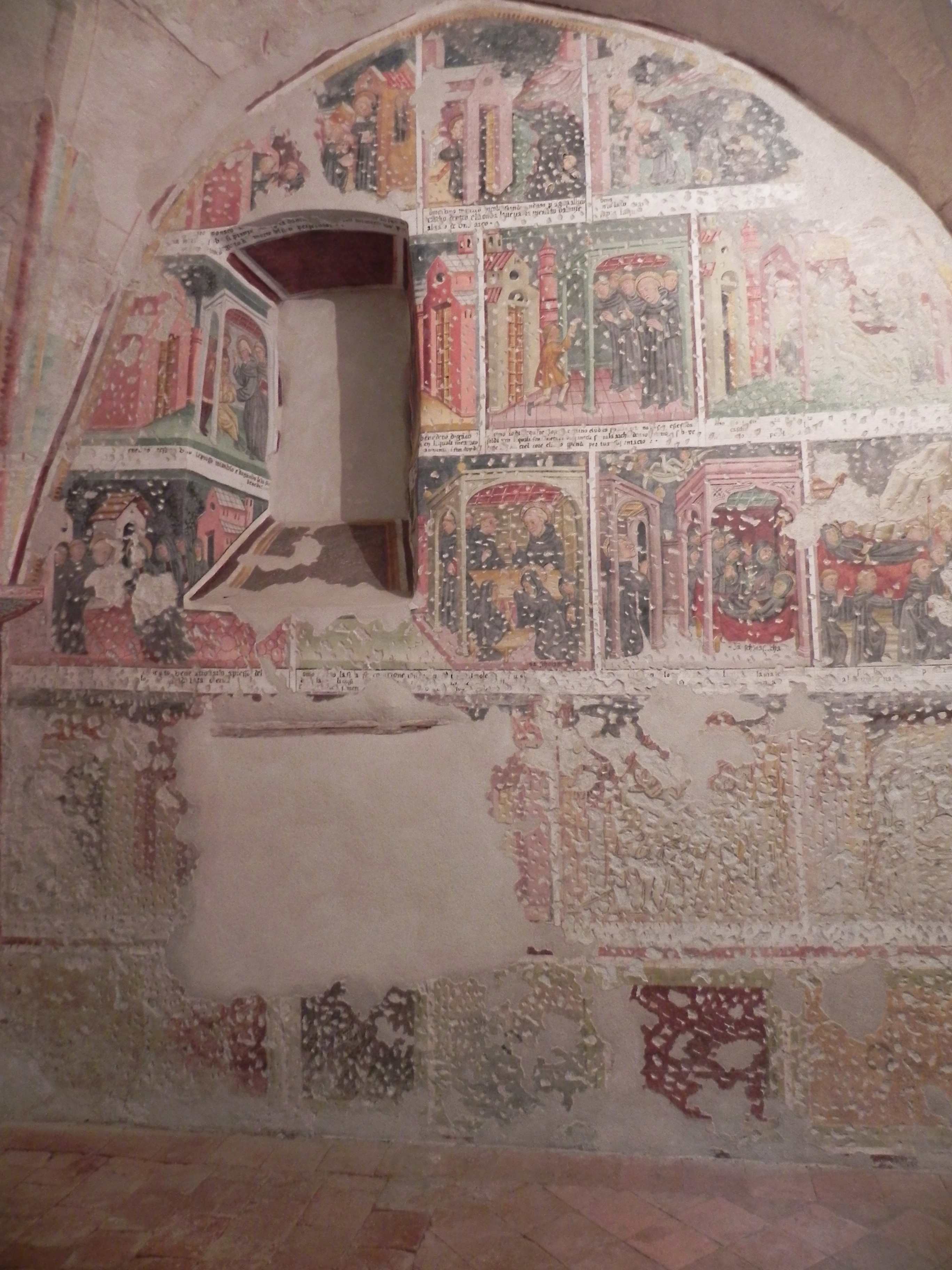 Gromo (BG) - Chiesa di San Giacomo Affreschi all'interno della cappella di San Benedetto